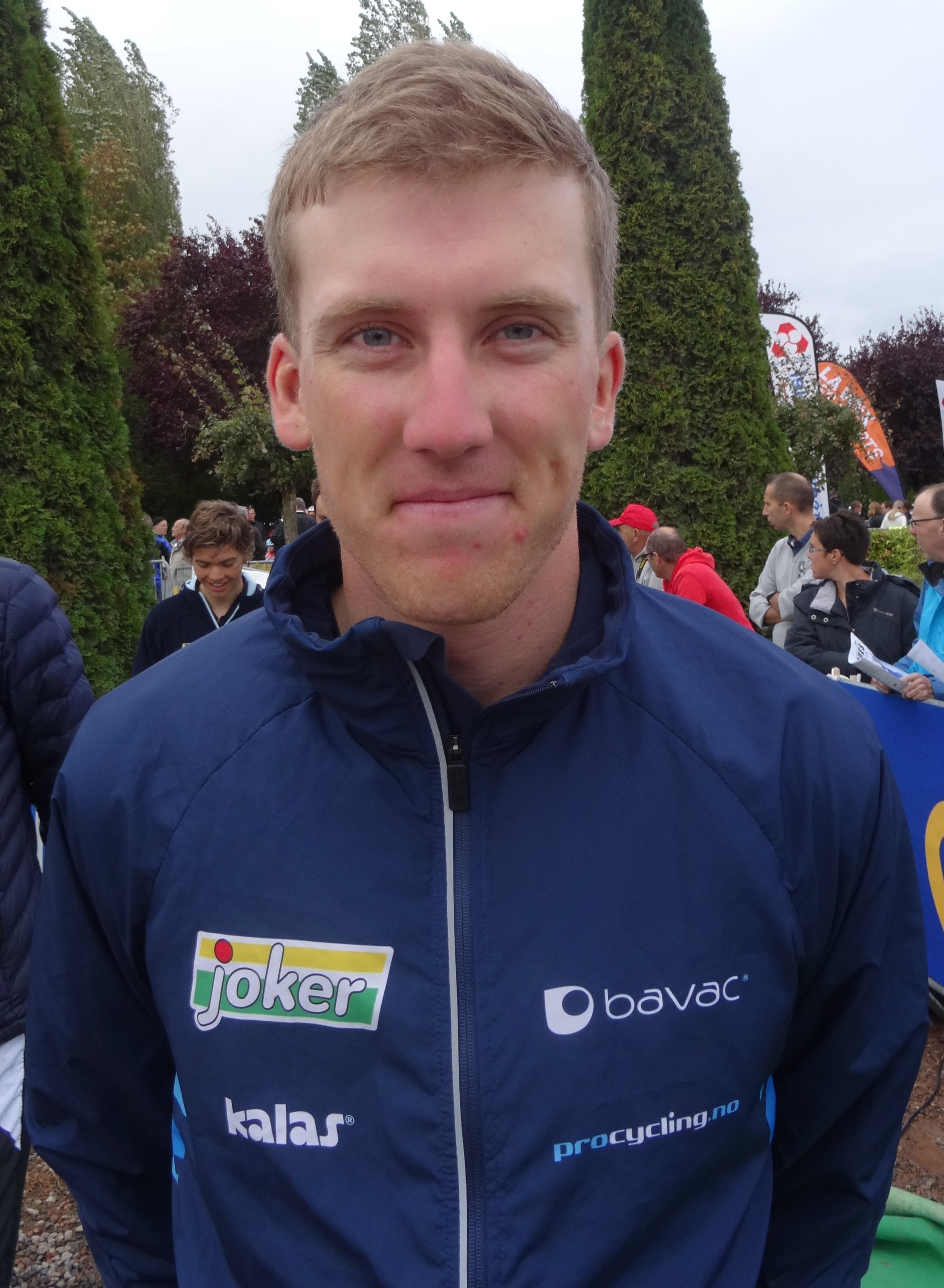 Reportage réalisé le dimanche 21 septembre à l'occasion du départ et de l'arrivée du Grand Prix d'Isbergues 2014 à Isbergues, Nord-Pas-de-Calais, France.